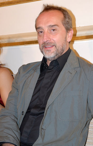 Gonzalo de Castro, actor español